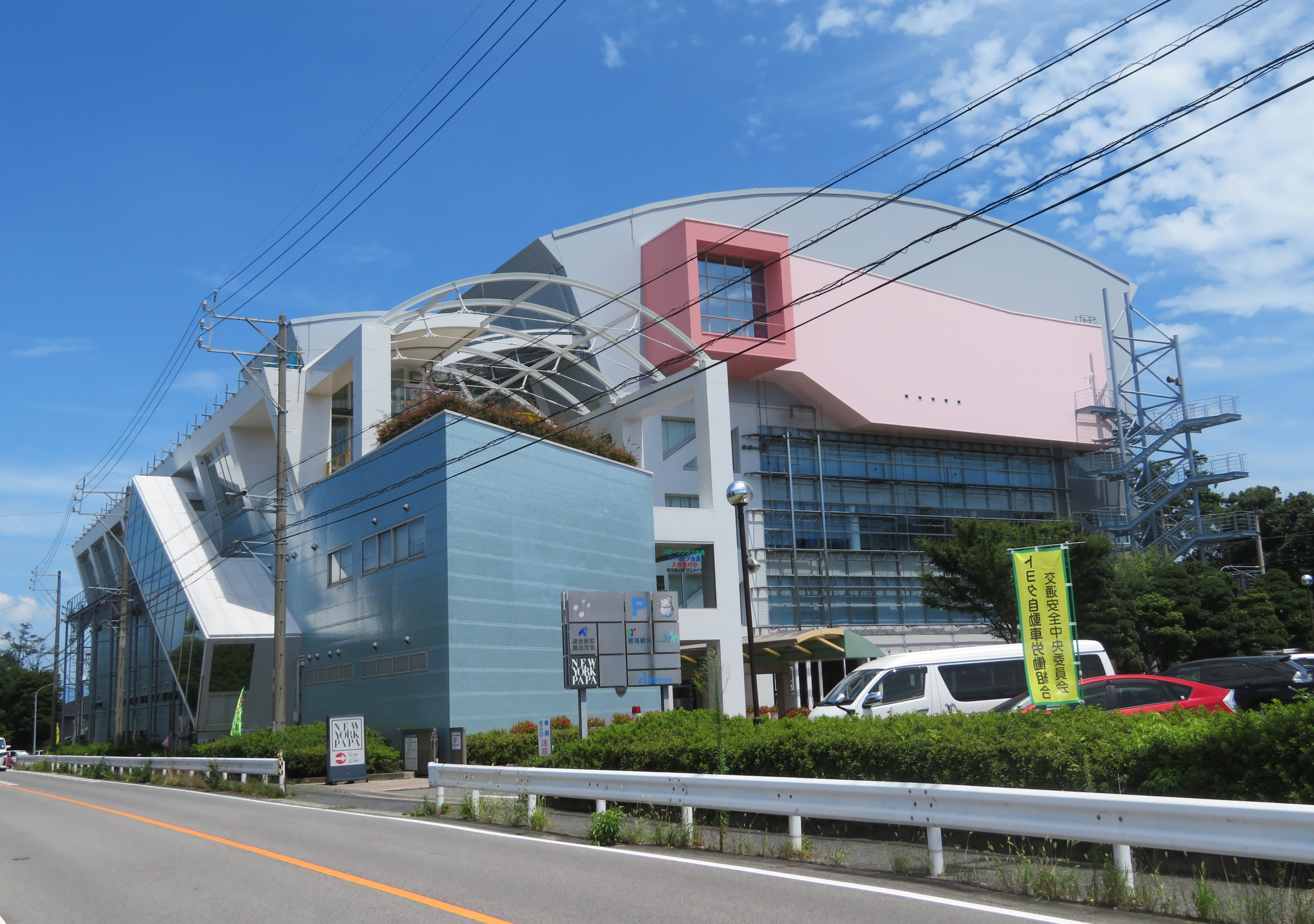 カバハウス（豊田市丸山町）。全トヨタ労連の事務所がある。